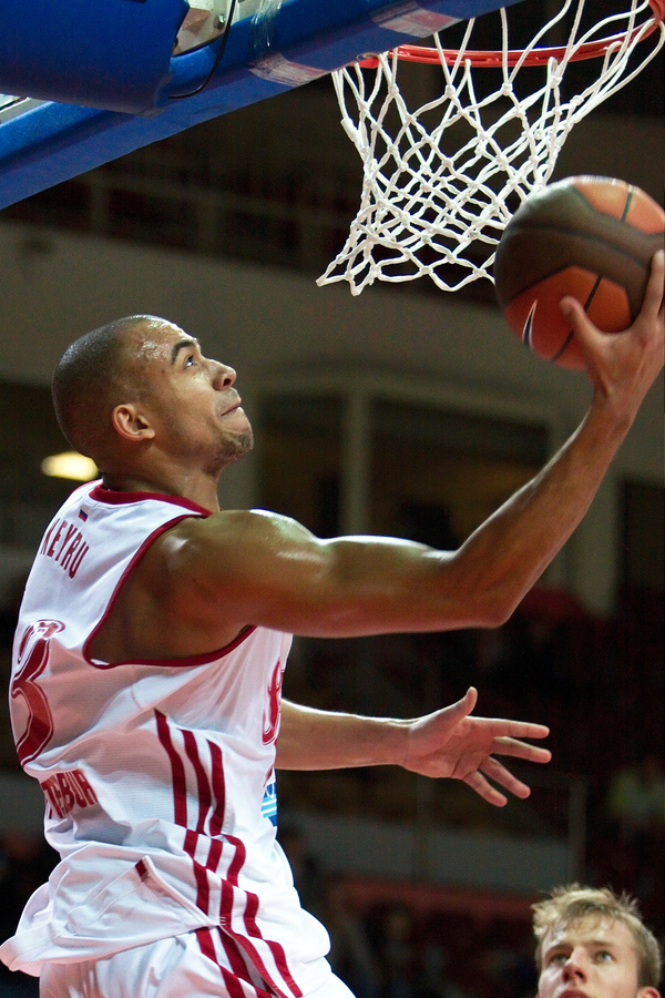 Виктор Кейру Российская Федерация. Санкт-Петербург. Баскетбол. Еврокубок. БК "Спартак" (Санкт-Петербург) - БК "Бенеттон" (Италия, Тревизо).